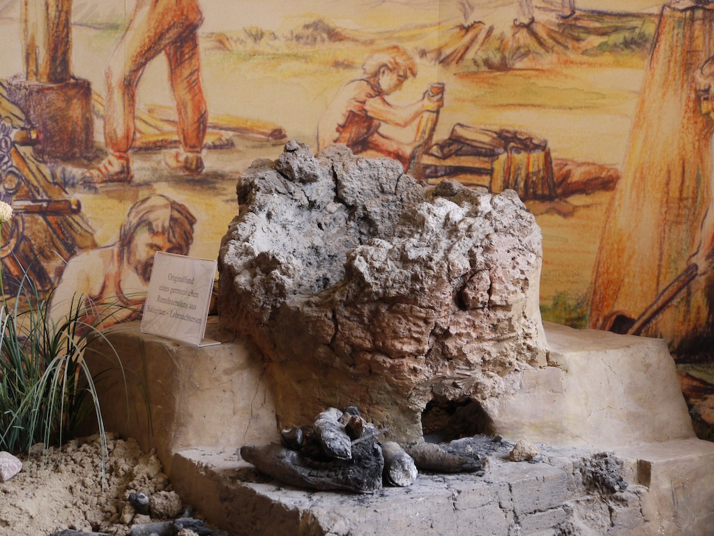 Rennofen aus einer Fundstelle bei Salzgitter-Lobmachtersen